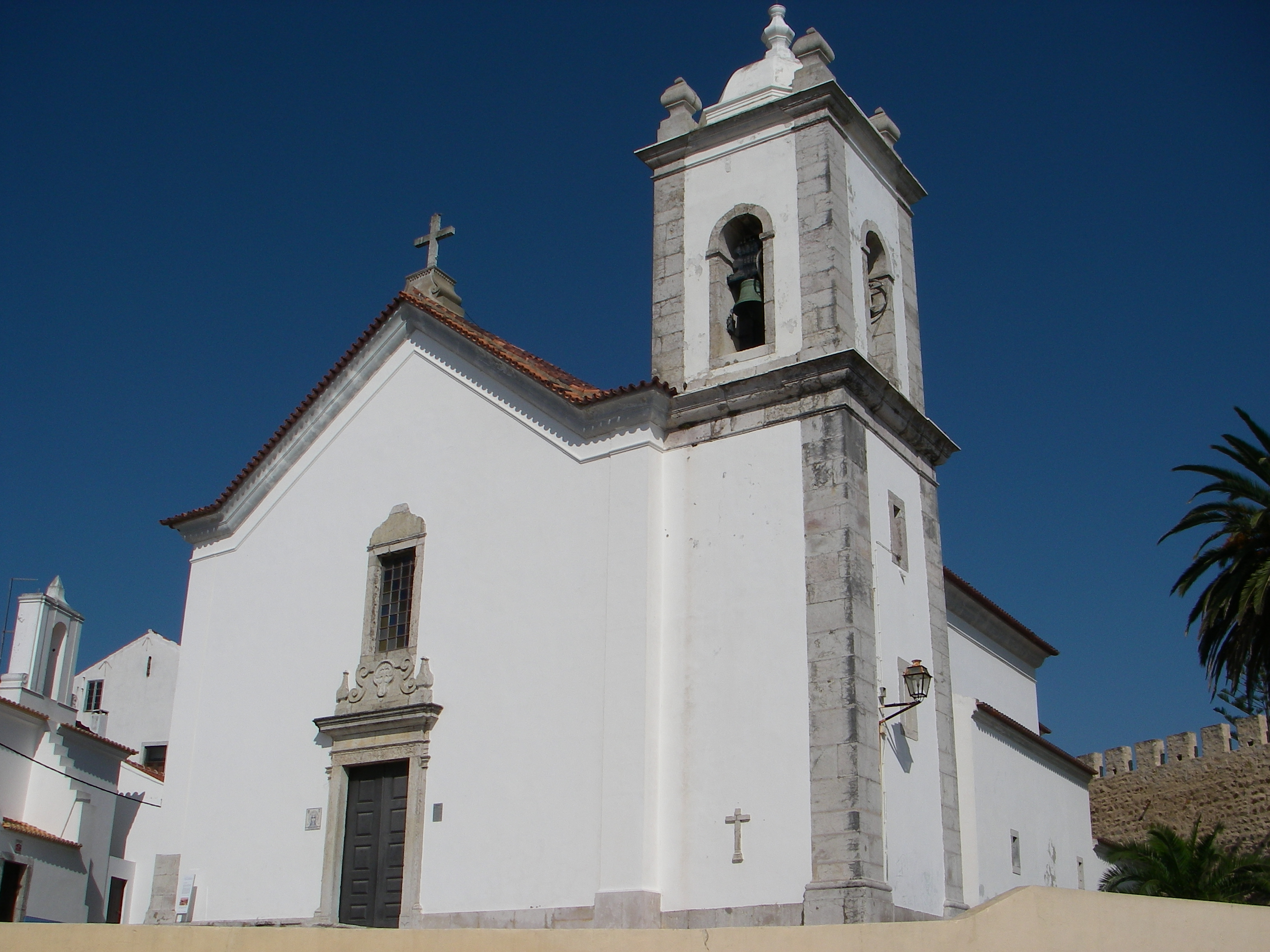 Sines - Igreja Matriz This file was uploaded for Wiki Loves Monuments in Portugal with the unique identifier 71336.